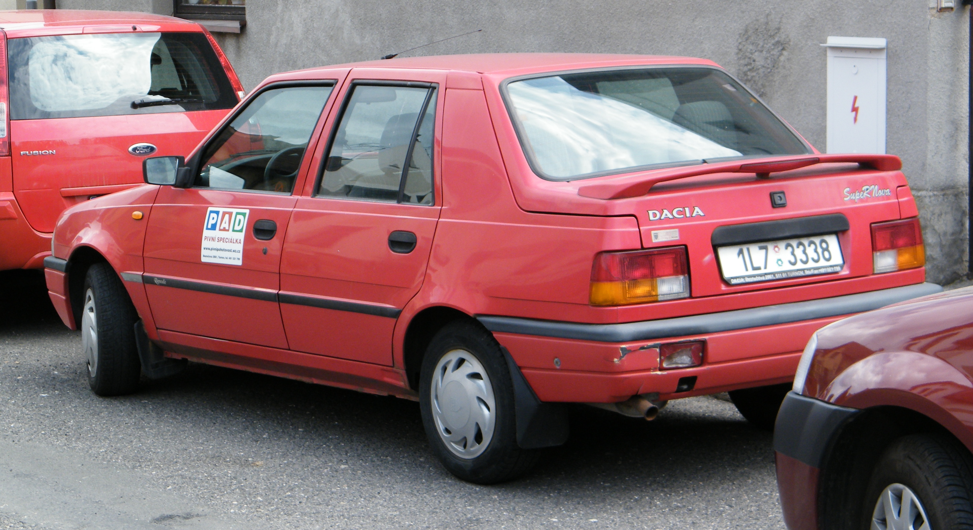 Dacia